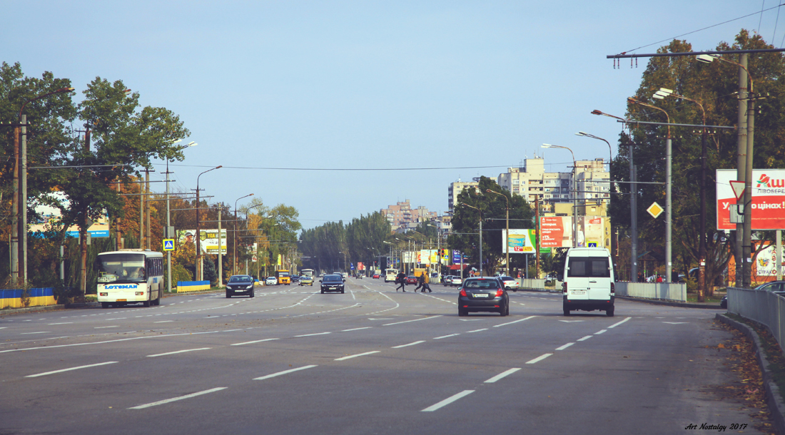 набережна в районі ж-м "Парус"